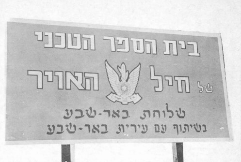 בית הספר הטכני של חיל האוויר באר שבע